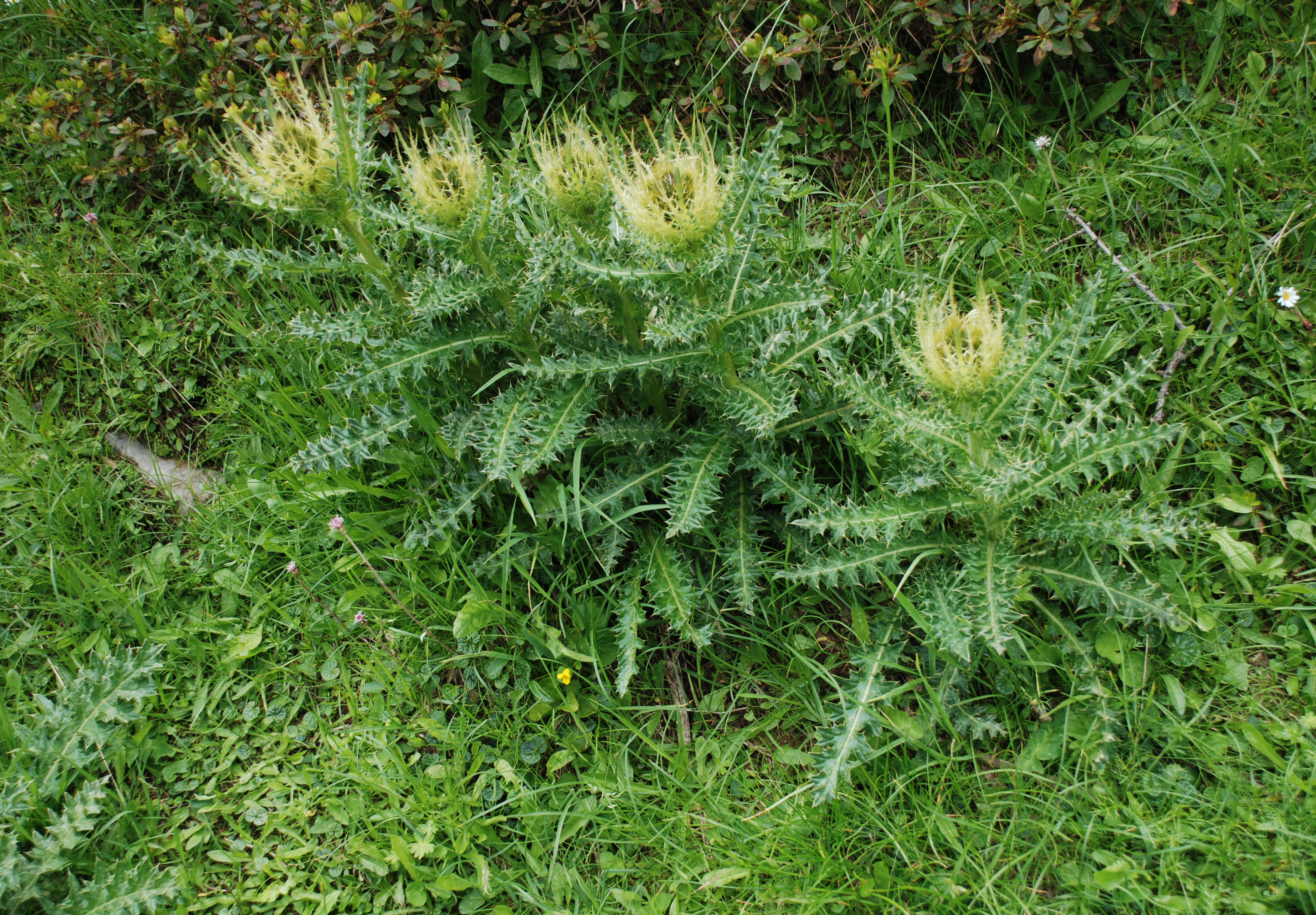 Cirsium spinosissimum . Molička planina, Slovenija.